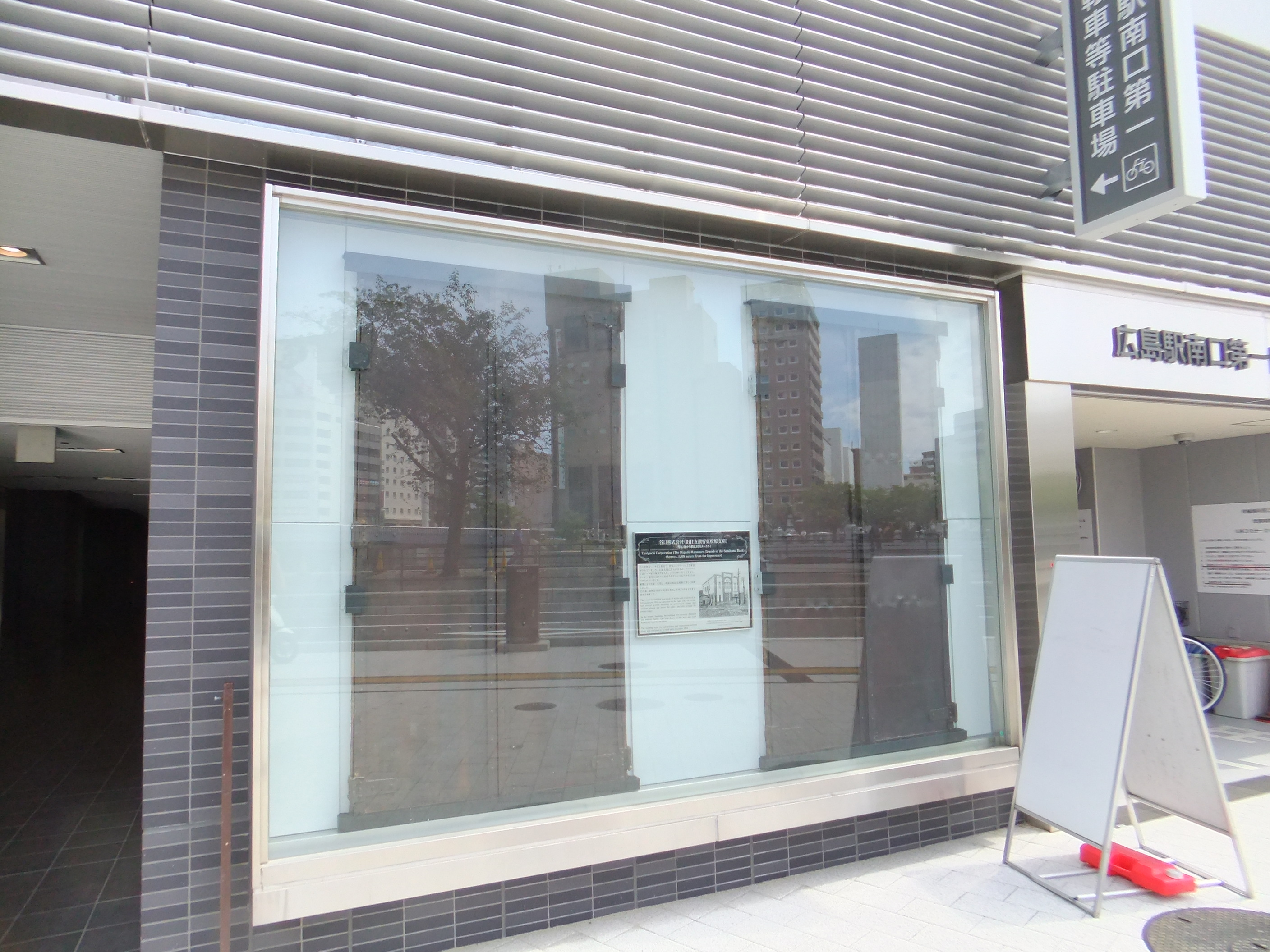 BIG FLONT ひろしまの壁に保存されている旧住友銀行東松原支店の鉄窓